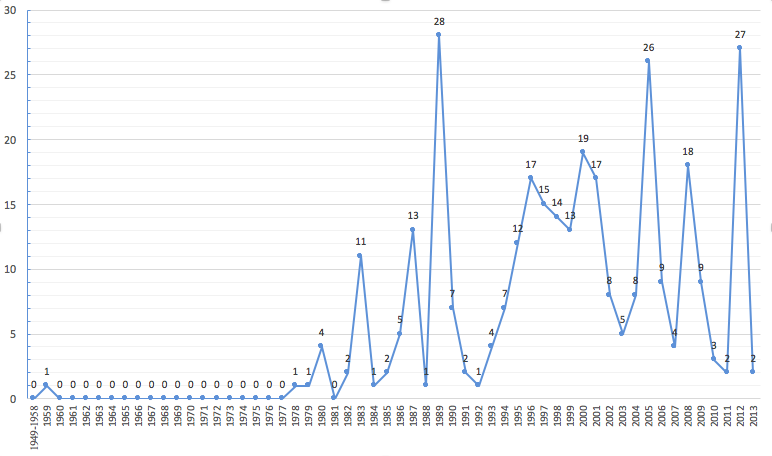 人民日報「傷害中國人民的感情」次數統計，根據臺灣中央研究院研究員資料繪製。